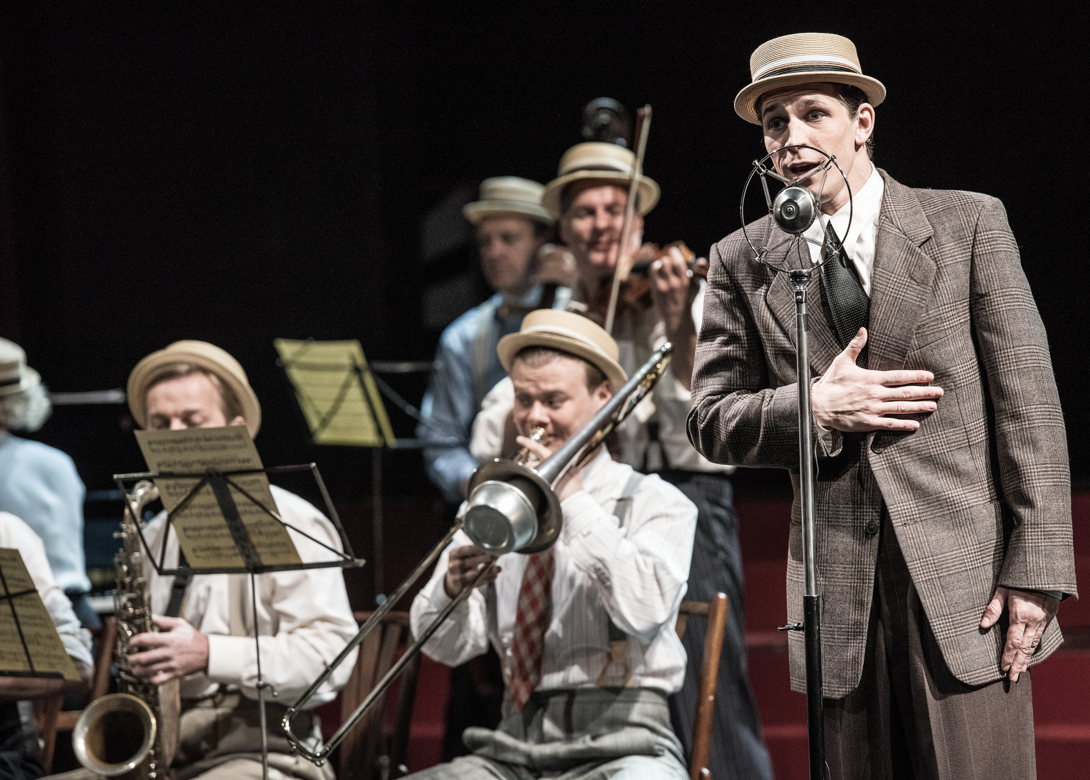 Záběr z inscenace „V rytmu swingu buší srdce mé“ (Národní divadlo, režie Ondřej Havelka, premiéra 2015). Igor Orozovič (u mikrofonu) v roli Jiřího Traxlera. V rolích členů orchestru: sedící Filip Kaňkovský a Jan Bidlas, stojící Martin Zbrožek j. h. a David Matásek.